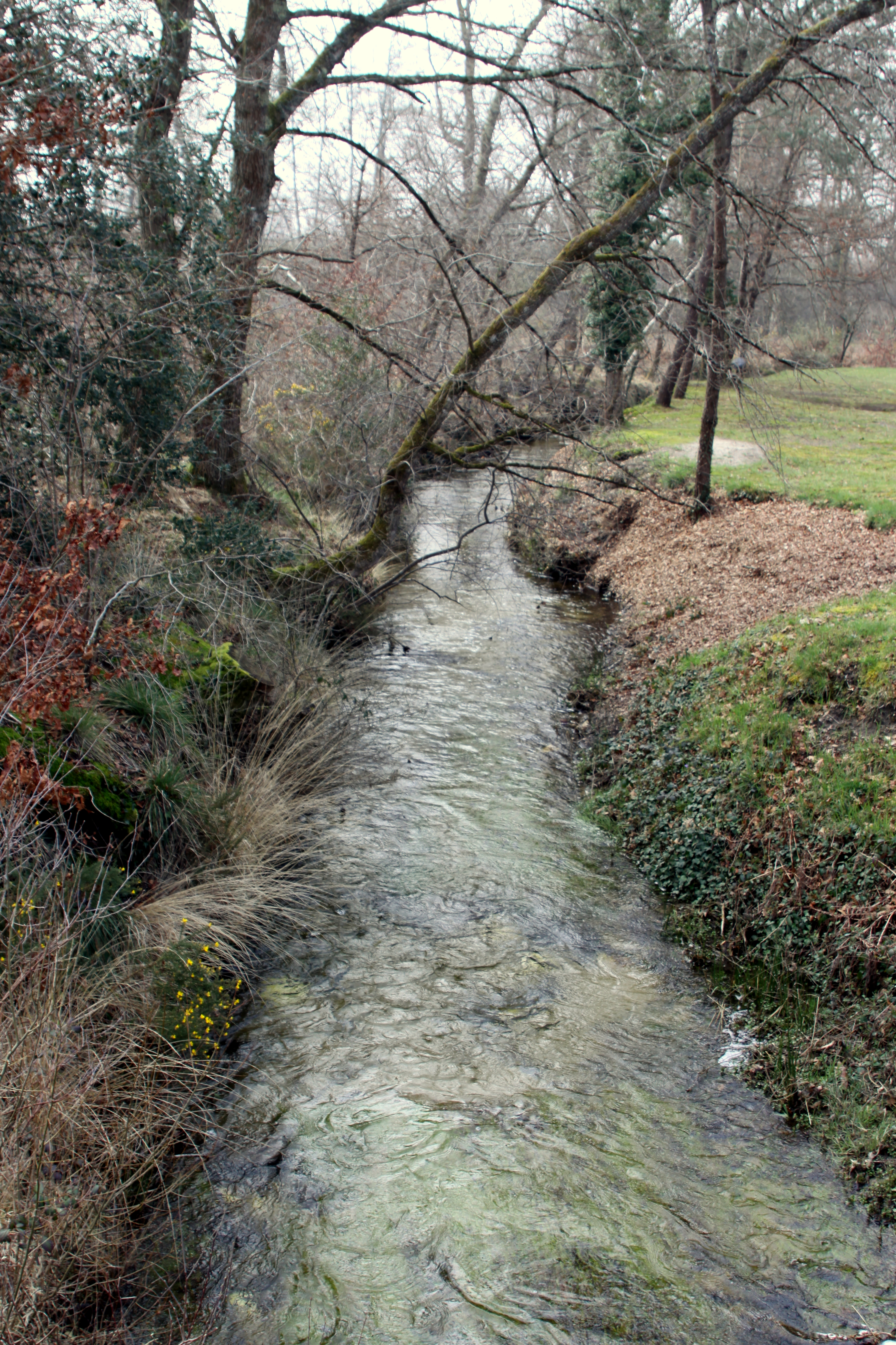 Baach Q2511020 zu Le Sen ass e rietsen Niwefloss vum Estrigon. D'Foto gouf de Bréck bei der Mille gemaach